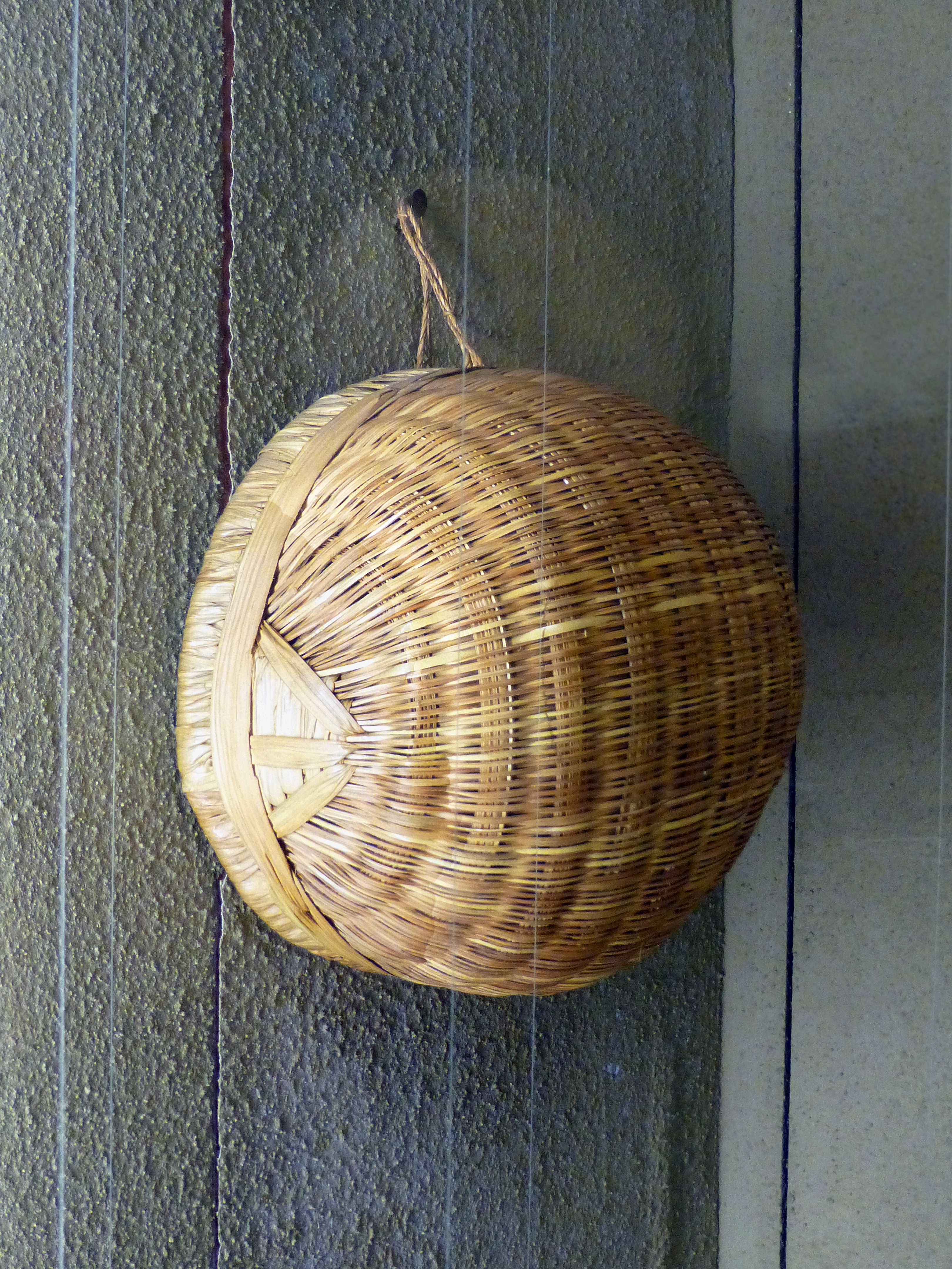 Panier semi-sphérique. Gourmantché. Niger. 1950. Musée africain de Lyon.